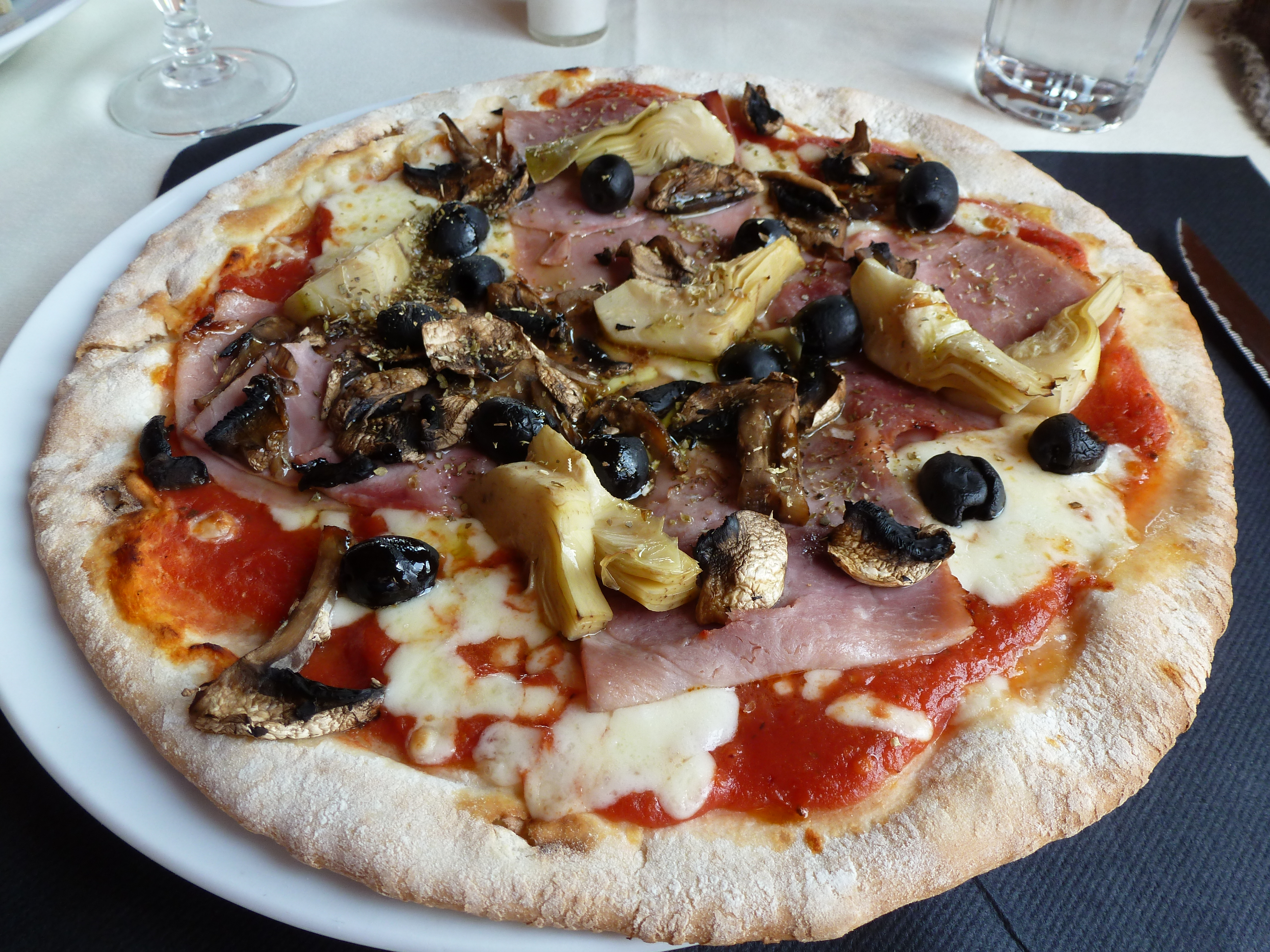 Pizza capricciosa in San Gimignano,Tuscany, Italy.